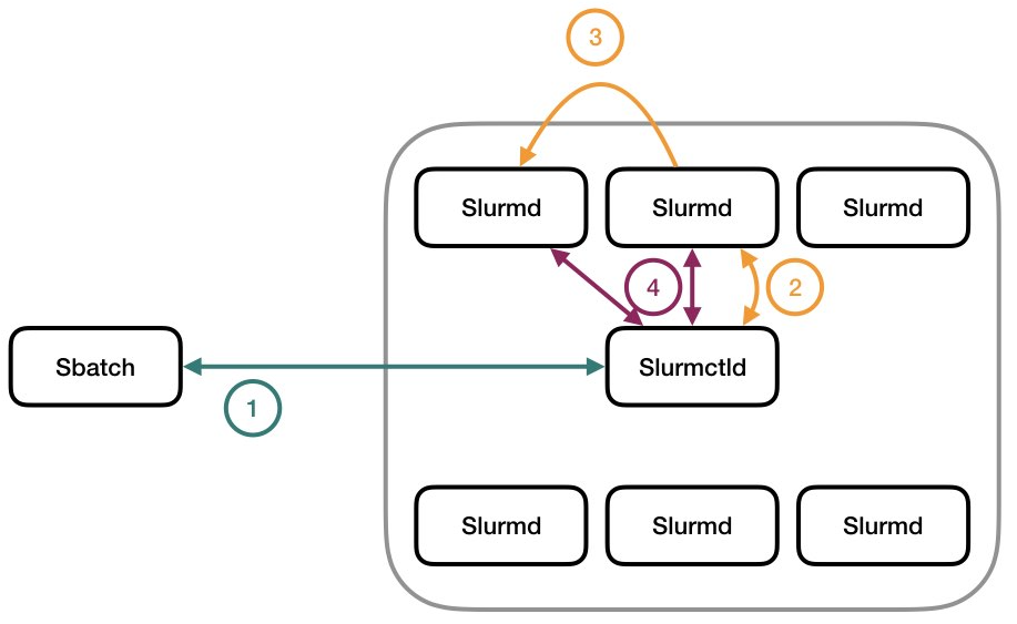 Interacció entre sbatch, slrumctld i slurmd